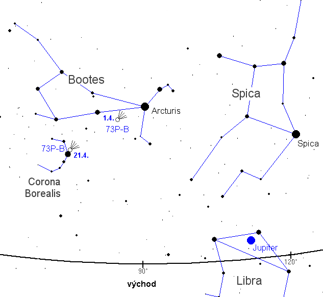 Hvězdná mapa s polohou komety 73P/Schwassmann-Wachmann 3-B v dubnu 2006.